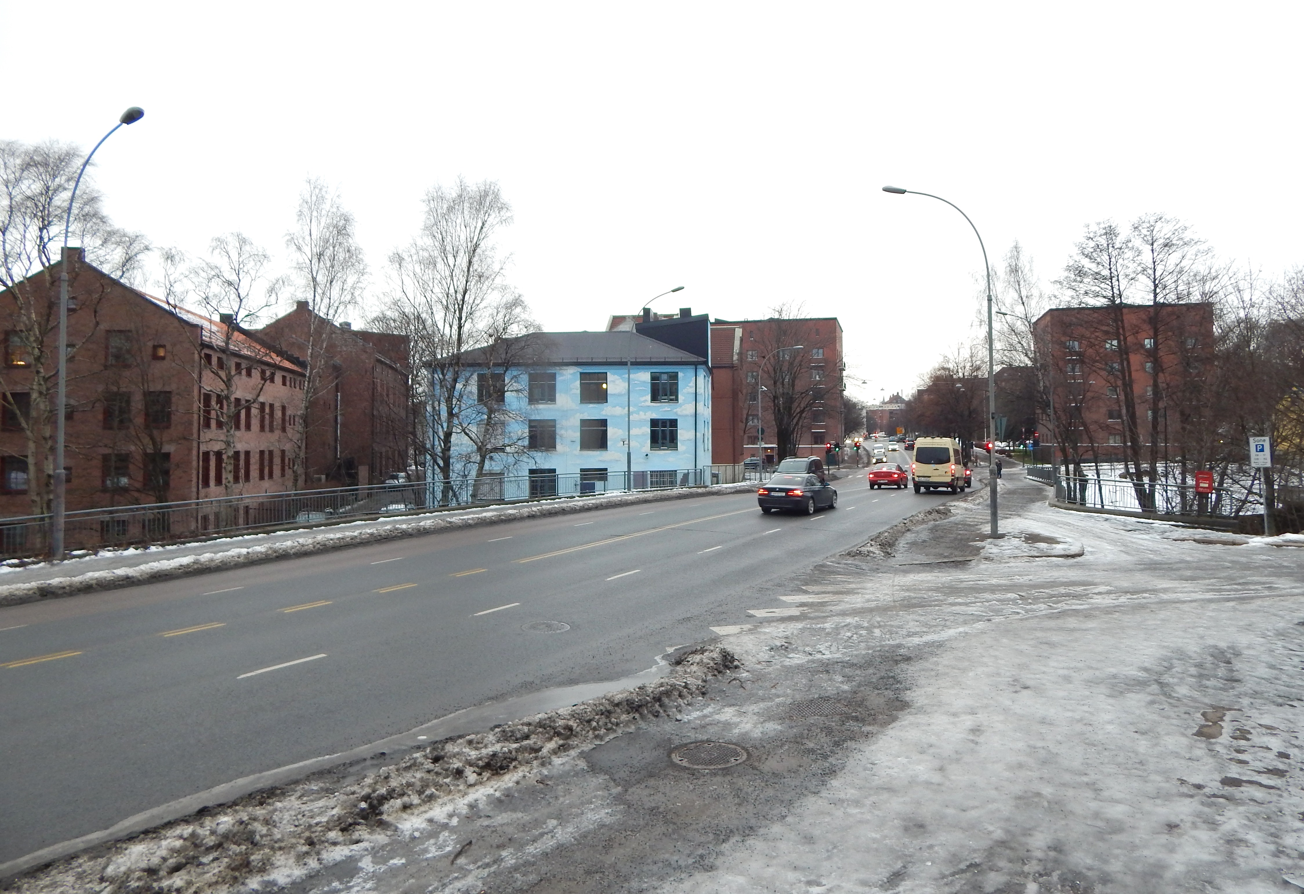 Vøyenbrua med Marcus Thranes gate sett fra østsiden